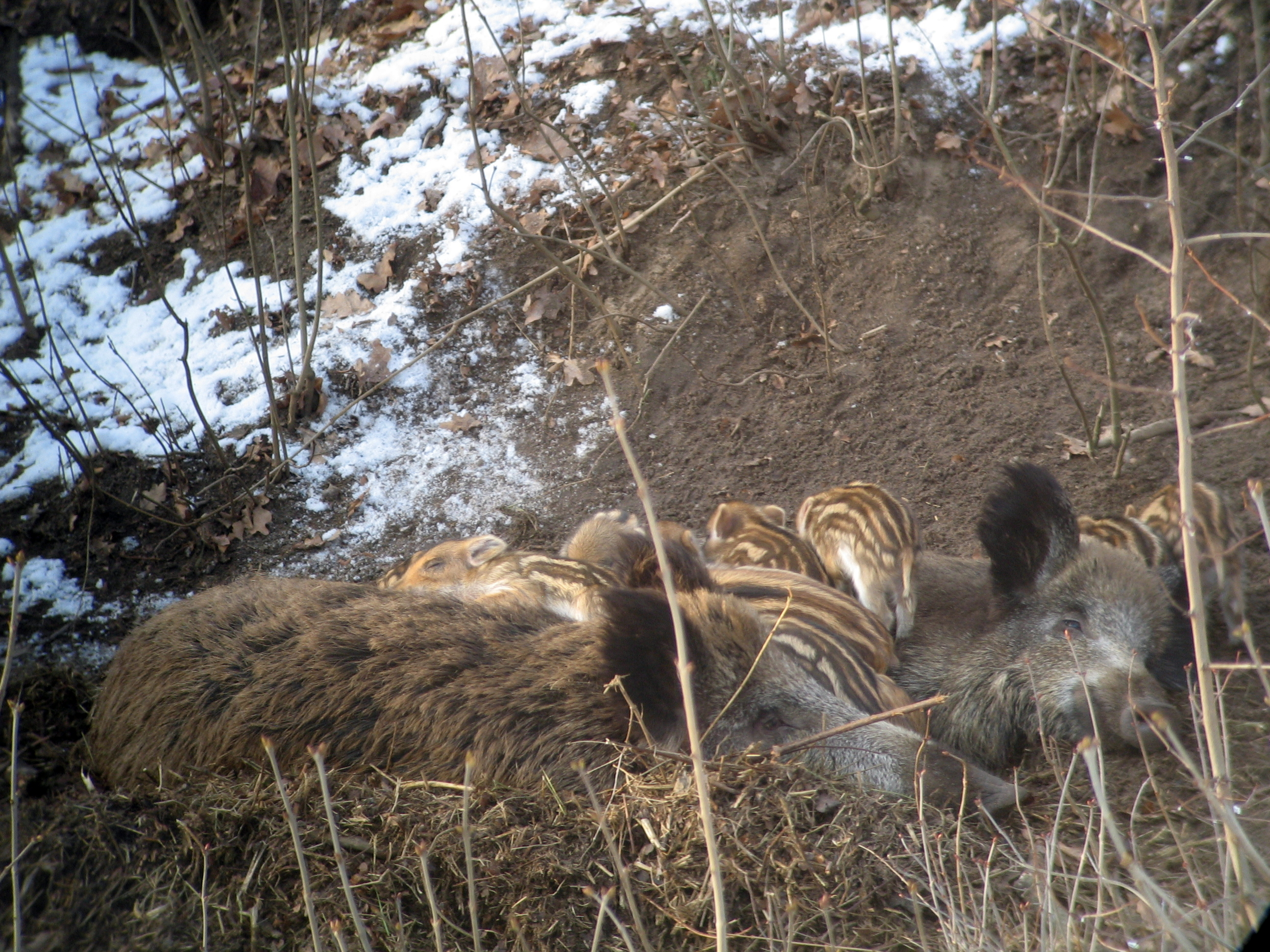 Frischlinge mit Bachen (Sus scrofa)